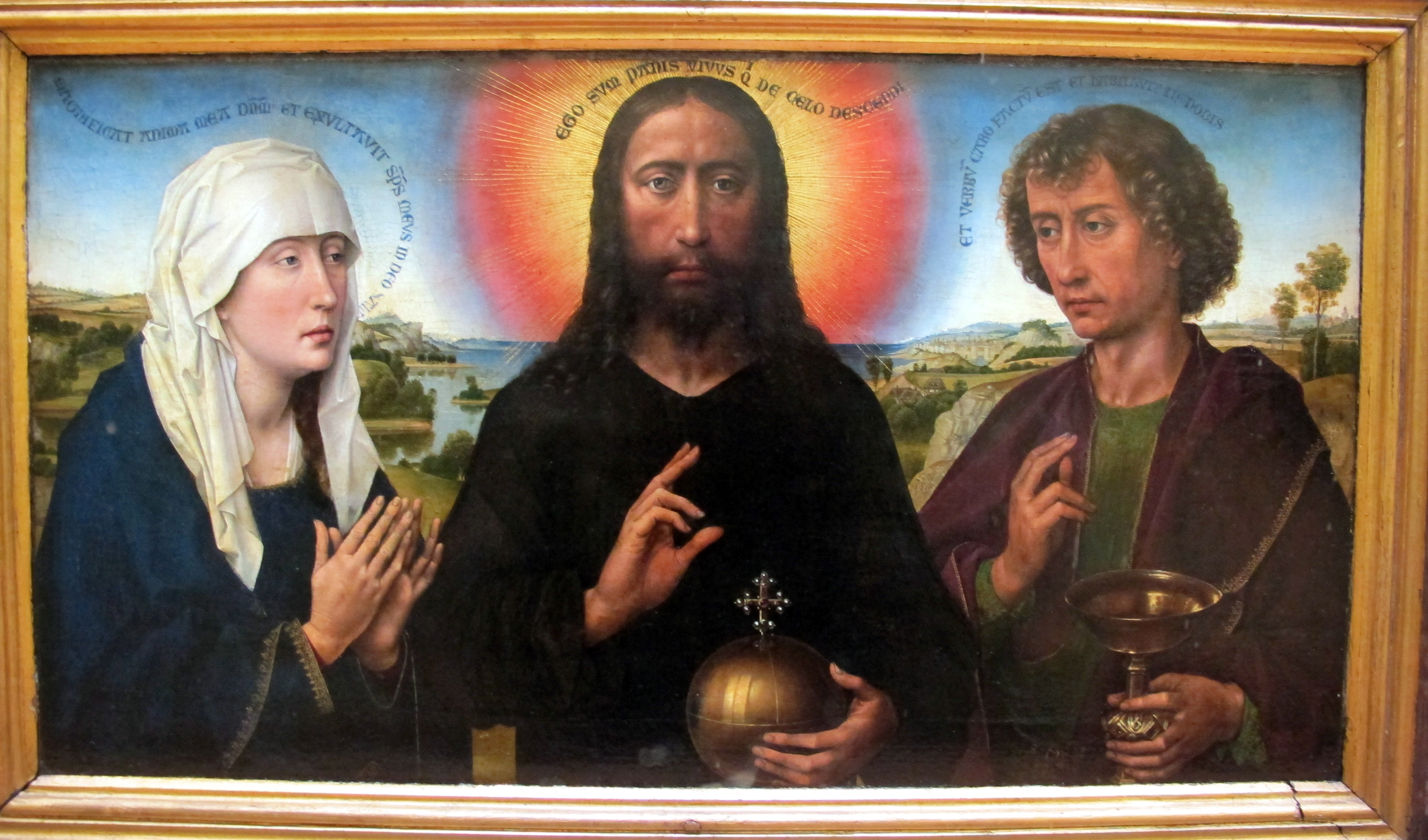 Pittura fiamminga al Louvre, Parigi